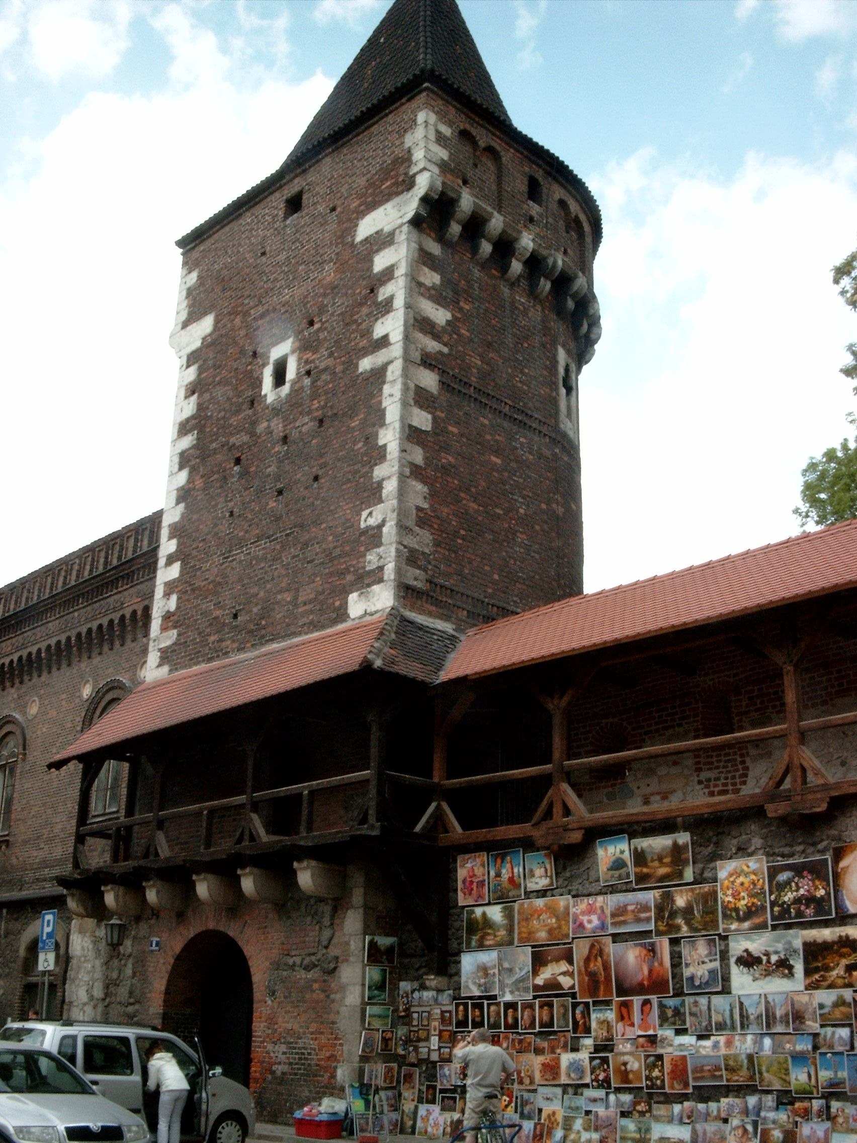 Baszta Stolarska, Kraków